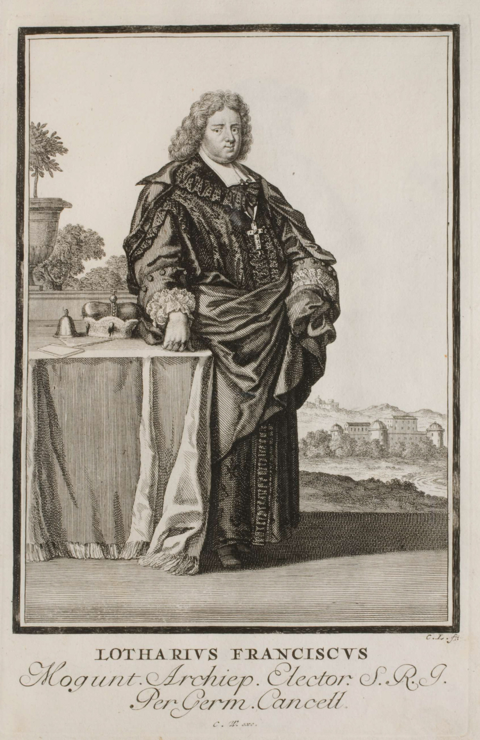 Neu-eröffnete Welt-Galleria. ..., Nürnberg 1703. 11. Lotharius Franciscus. Mogunt. Archiep. Elector. S. R. I. Per Germ. Cancell.